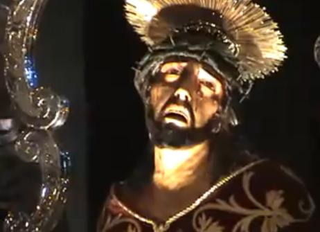 Señor de las Tribulaciones venerado en la Iglesia de San Francisco de Asís de Santa Cruz de Tenerife